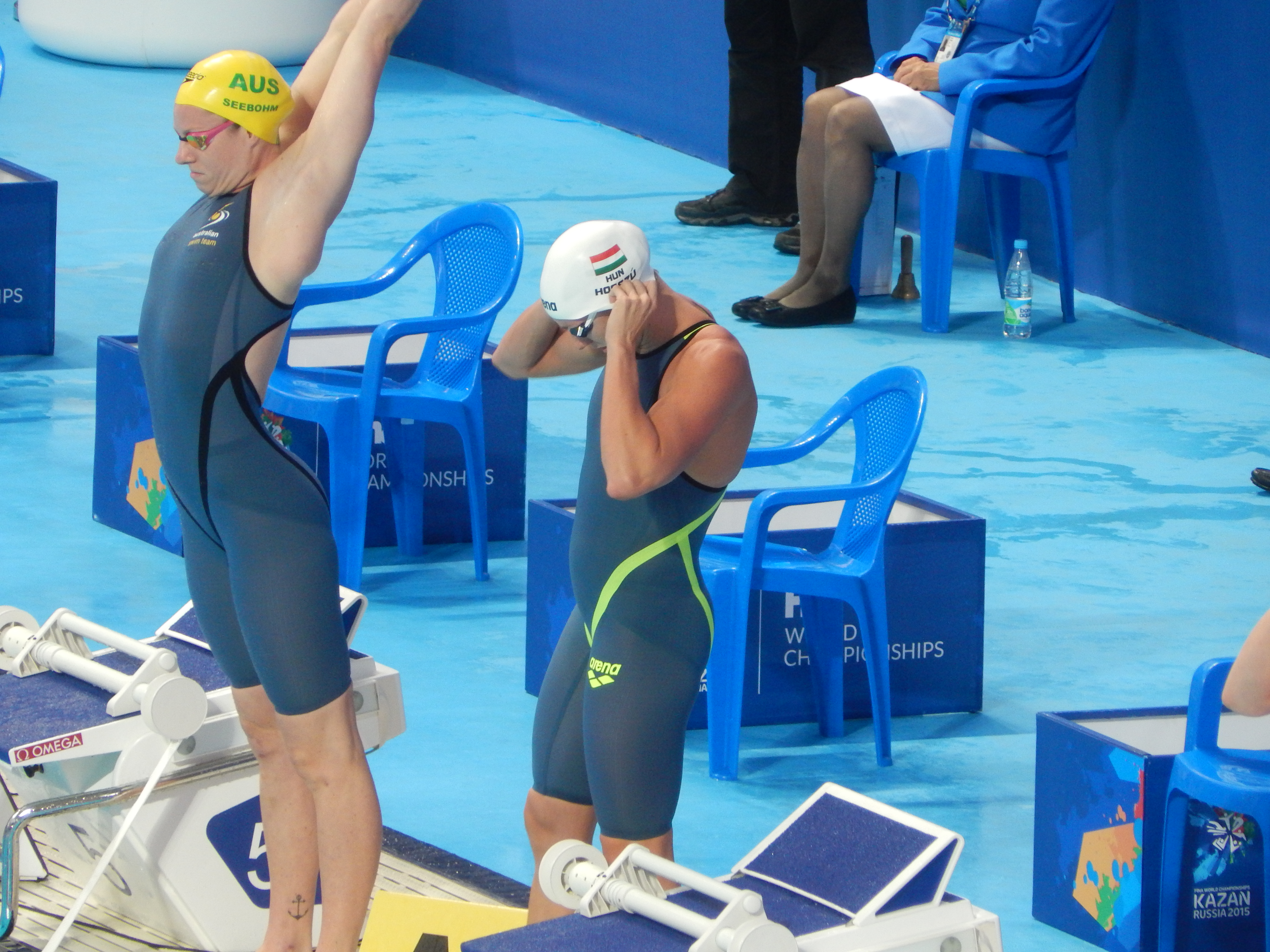 Эмили Сибом и Катинка Хоссу